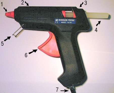 Heissklebepistole 1. Klebedüse 2. Heizung 3. Transportmechanismus 4. Heißkleber 5. Ständer 6. Abzug / Transporthebel 7. Anschlusskabel